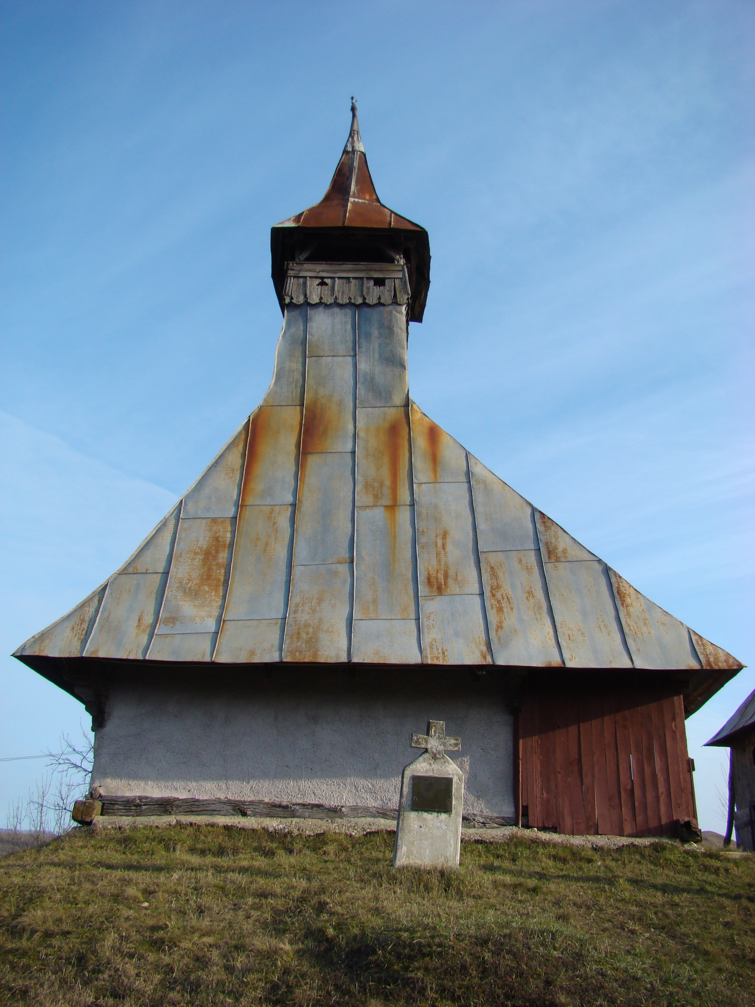 Biserica de lemn „Sf.Arhangheli” din Crișeni, județul Cluj